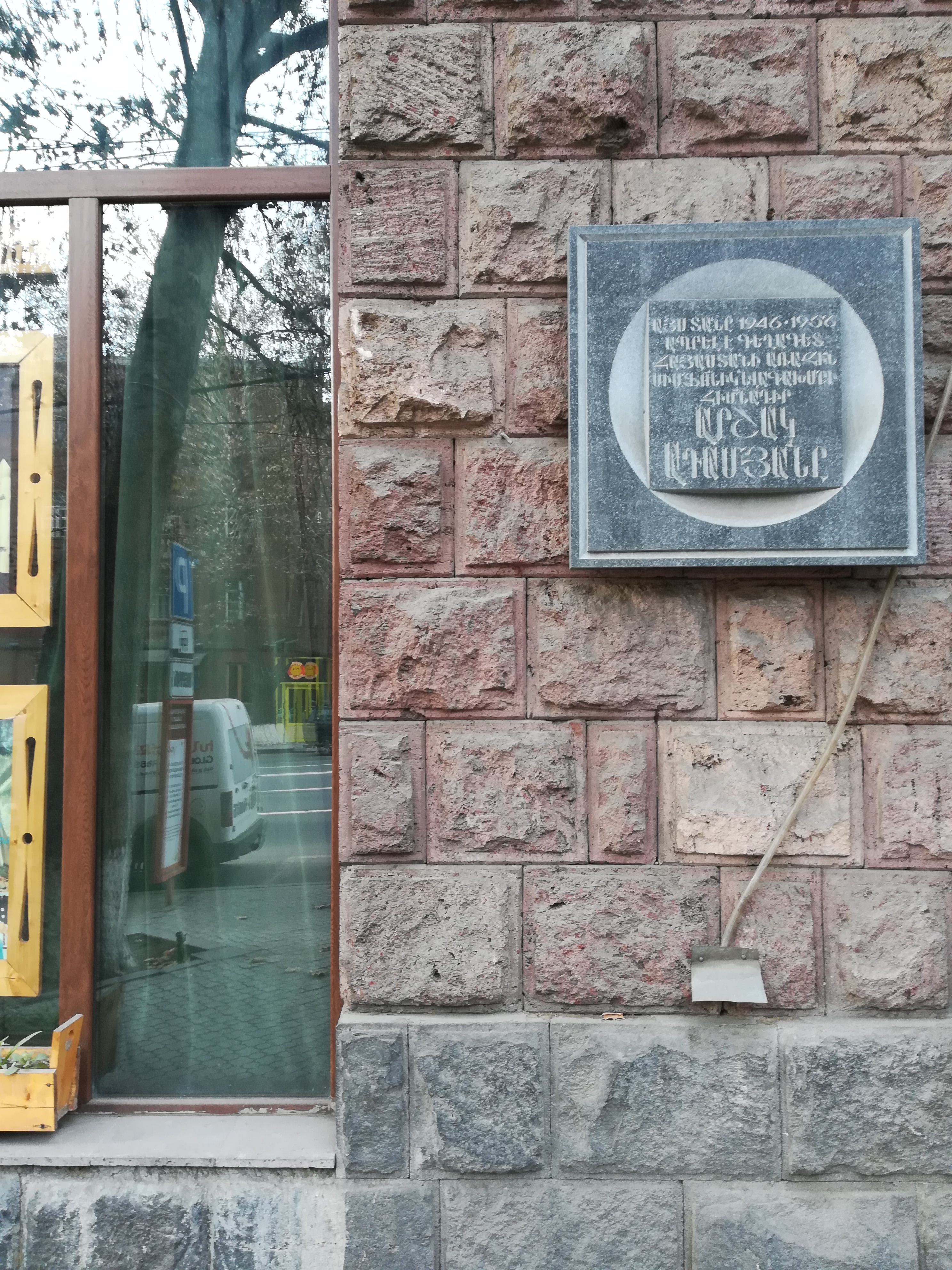 Ереван